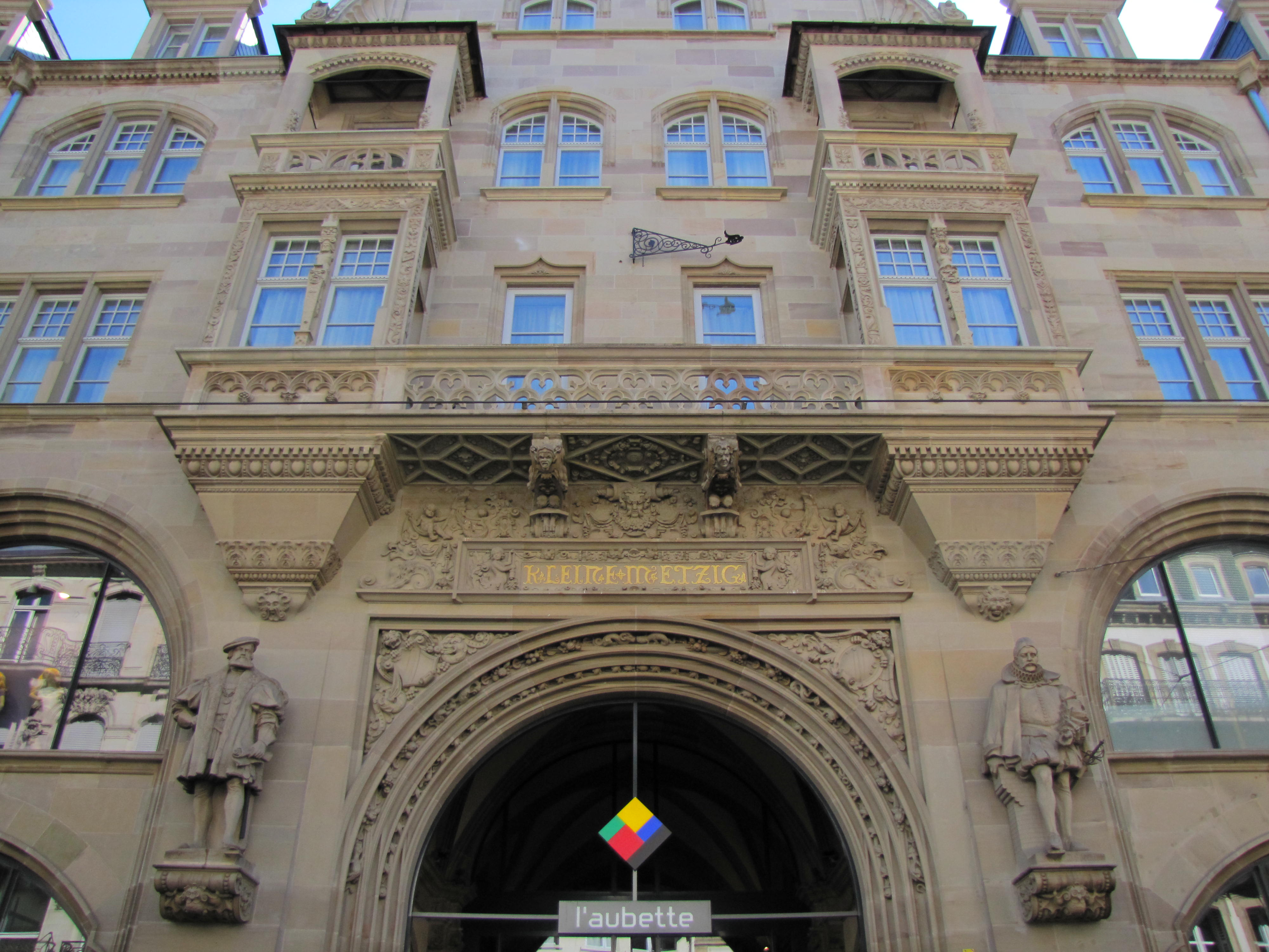 Alsace, Bas-Rhin, Strasbourg, Kleine Metzig ("Petites Boucheries") (1900), 4 rue de la Haute-Montée.